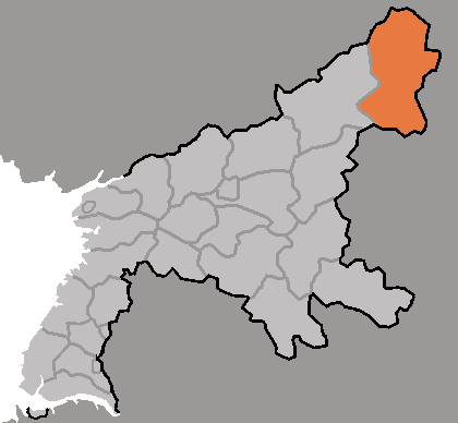 Map of Dahung, Pyongan-namdo, DPRK, 2006